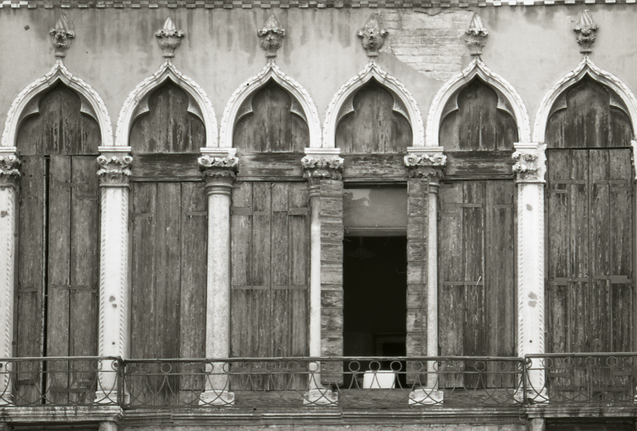 Servizio fotografico : Venezia, 1969 / Paolo Monti. - Strisce: 7, Fotogrammi complessivi: 36 : Negativo b/n, gelatina bromuro d'argento/ pellicola ; 35 mm. - ((I fotogrammi hanno una doppia numerazione. . - Sul portanegativi: Nikon Pan F Ilford. - I soggeti sono elencati all'interno del portanegativi. - Occasione: Pubblicazione: "Edoardo ARSLAN, Venezia gotica: architettura civile gotica veneziana, Milano, Electa, 1970"